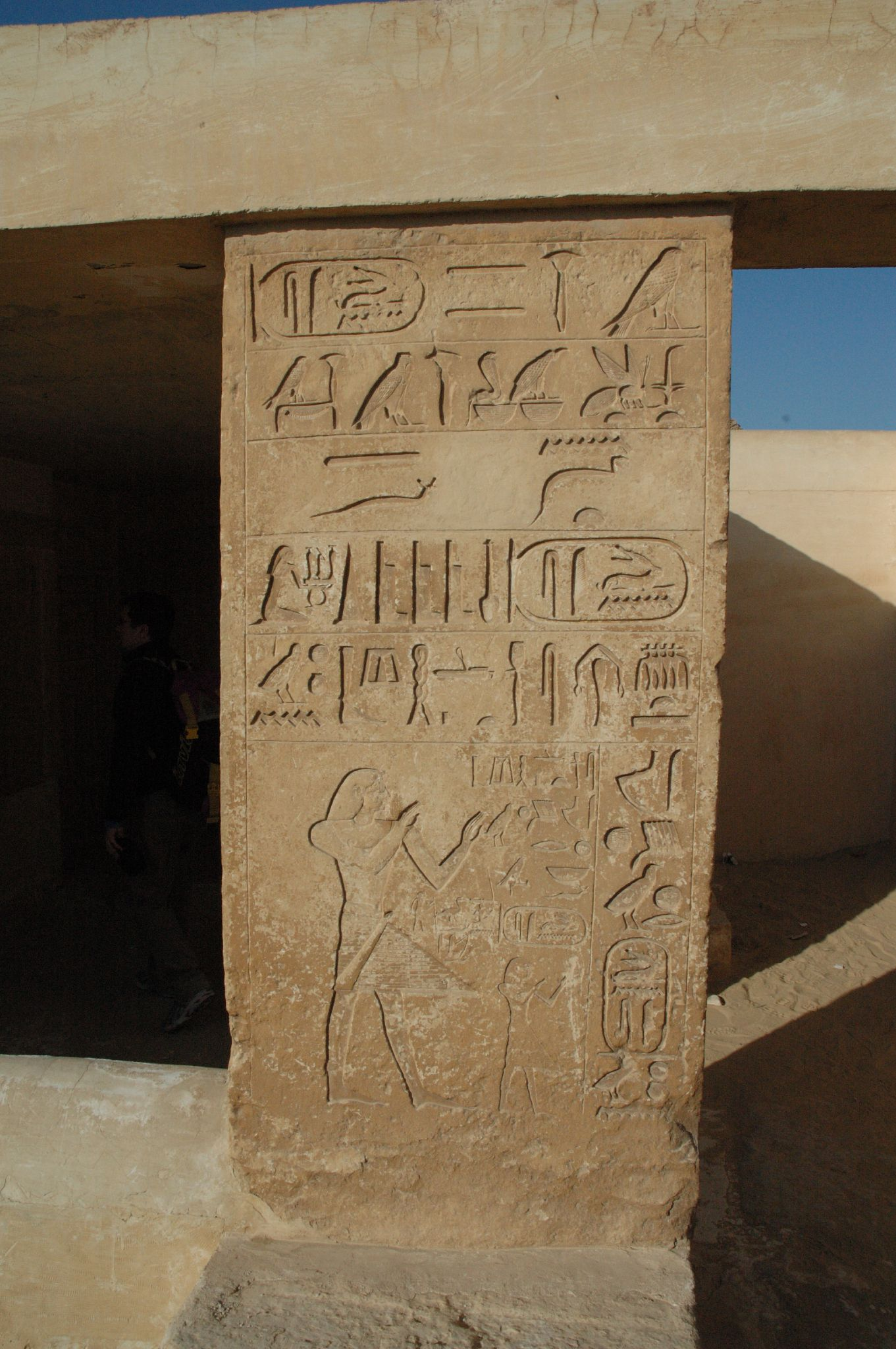 Saqqara mastabas. Unas cartouches.